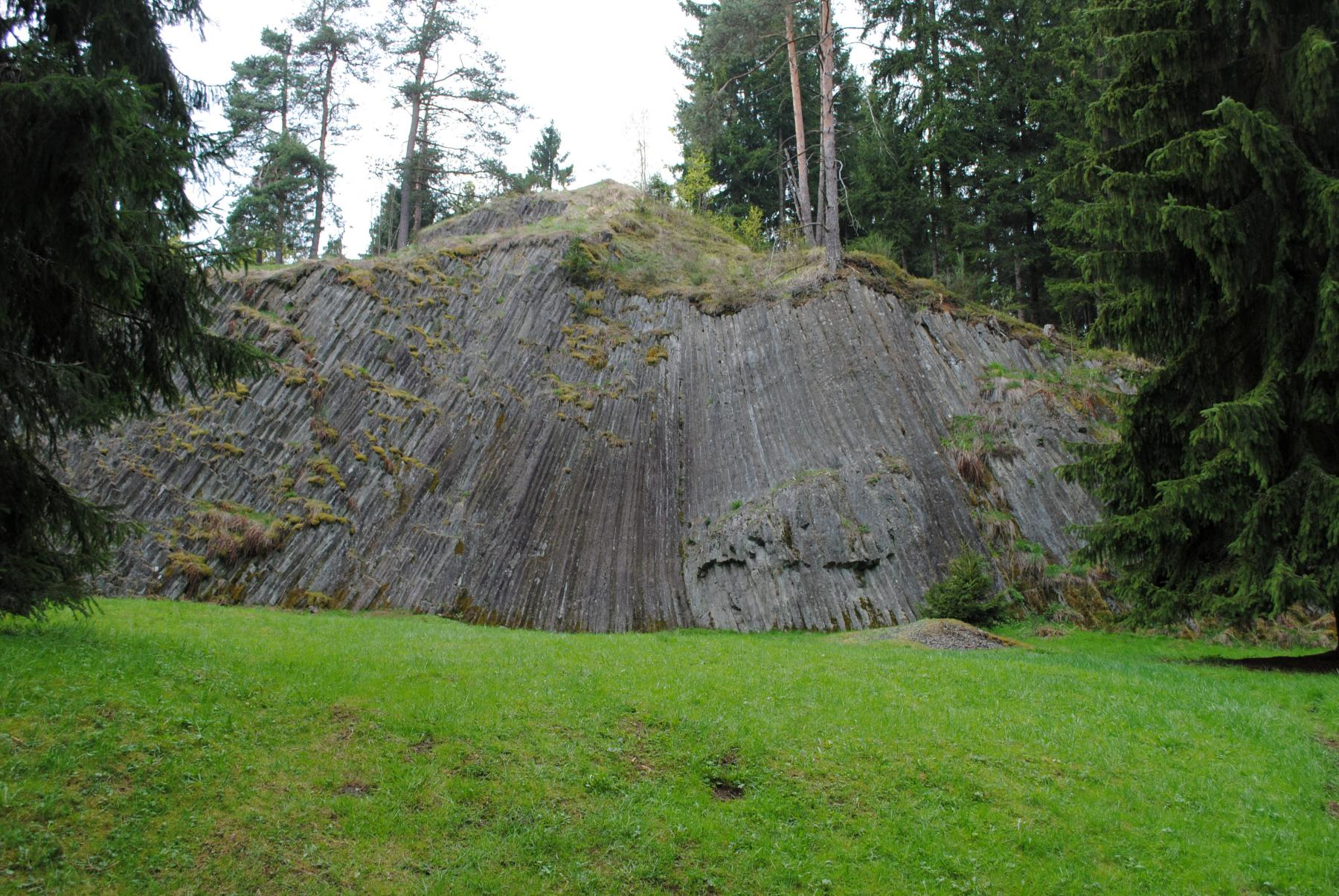 die sogenannten "Basaltorgeln" (Rotavské varhany) im Wald bei Rotava in Tschechien